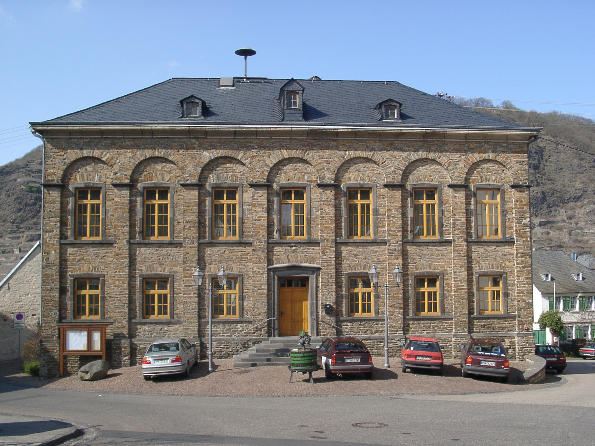 Dieblich, Alte Schule - selbst fotografiert (Klaus Graf) 23.3.2005 - Lizenz: CC-BY